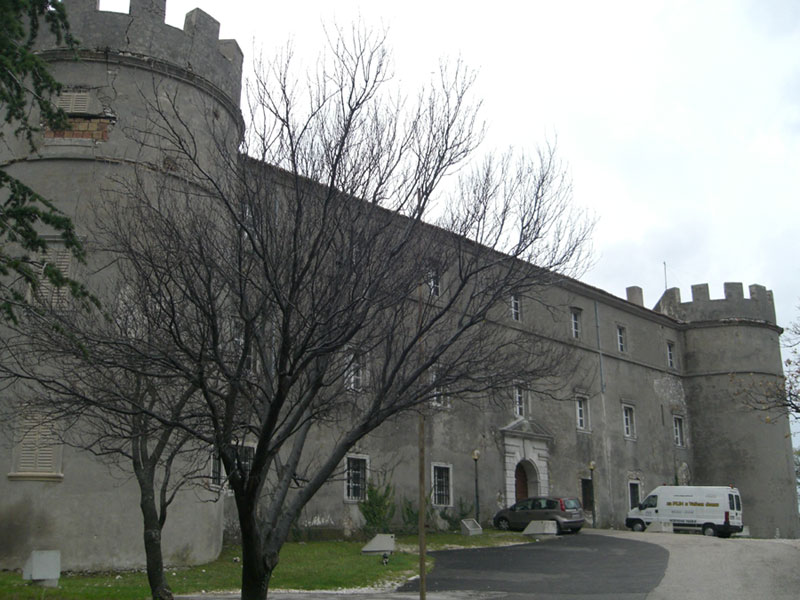 Dvorac Nova Kraljevica u Kraljevici, sjeverni zid.